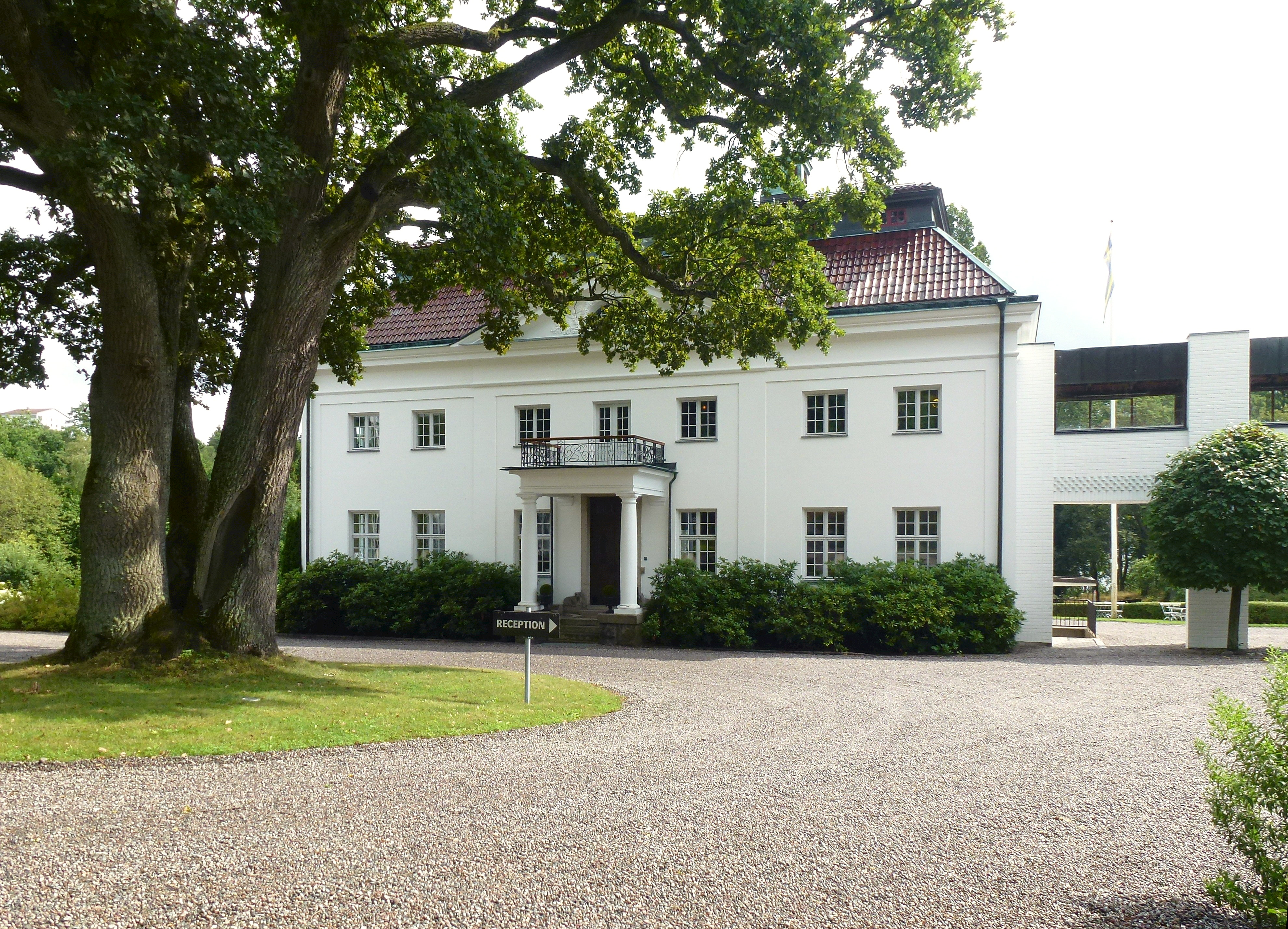 Bergendahl Meetings herrgården